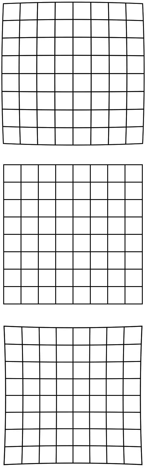 Vertekende afbeelding door een lenzenstelsel. Eigen werk.